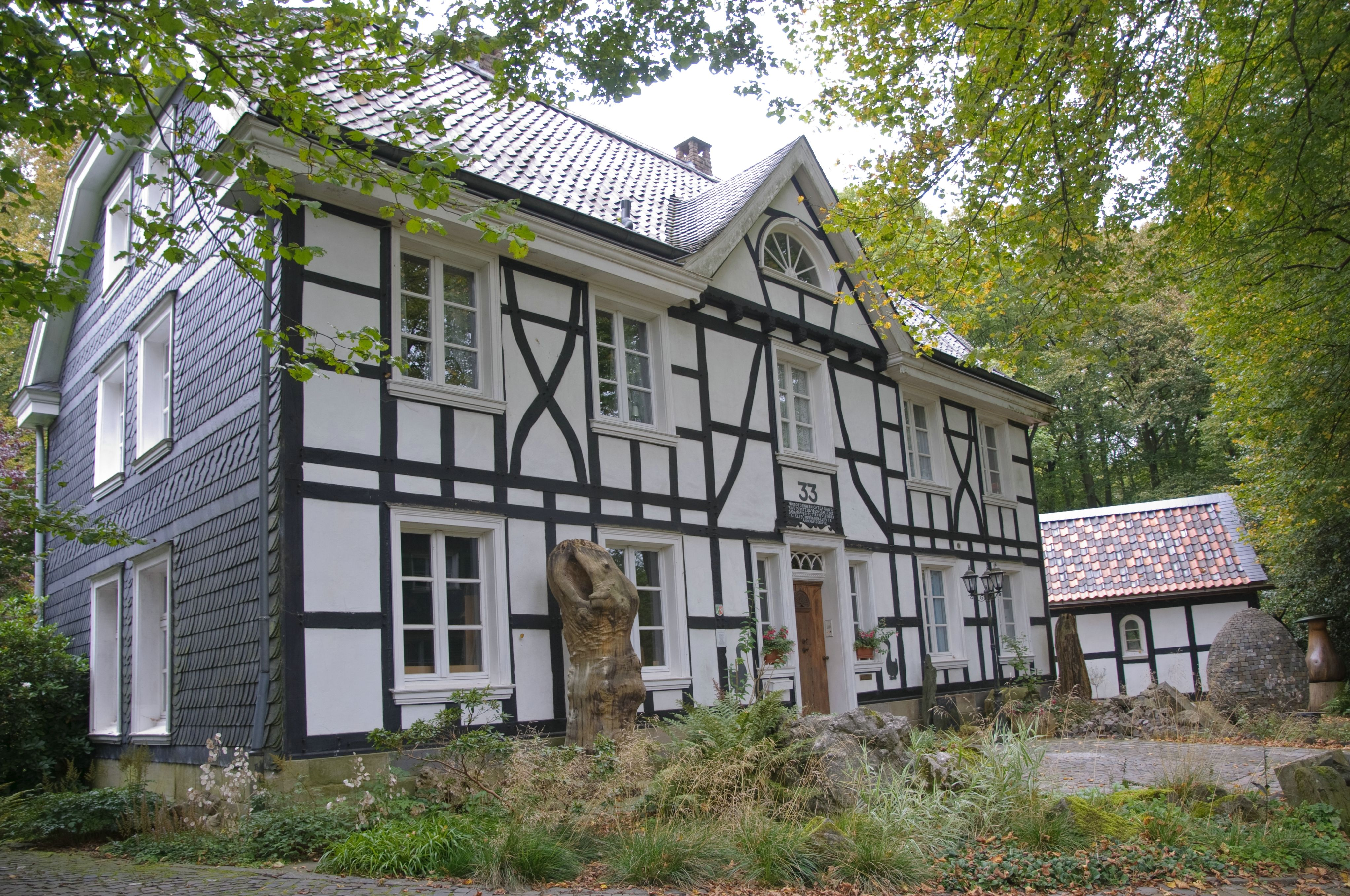 Spessartweg 33, Fachwerkhaus, Baudenkmal